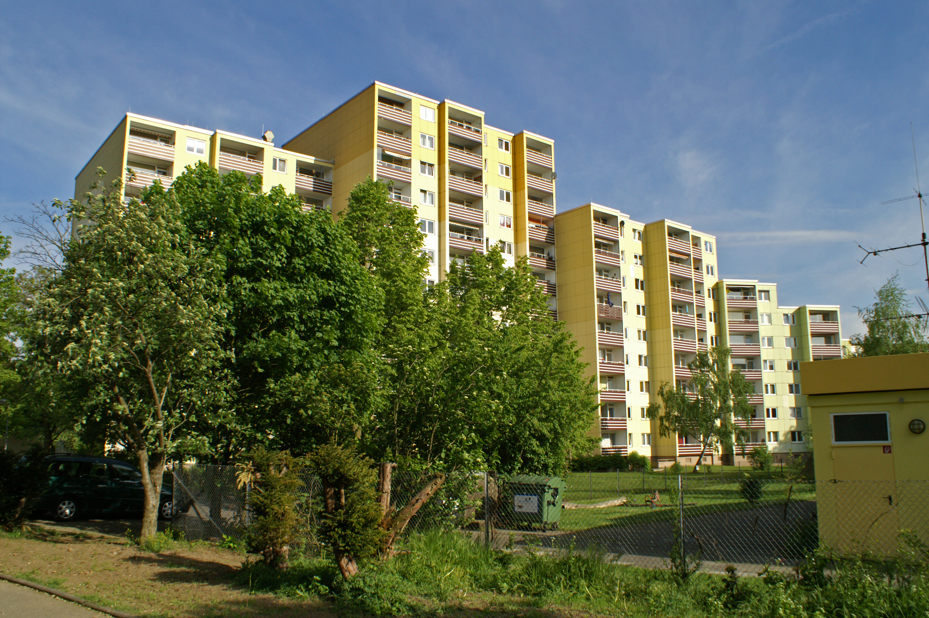 Hochhaus an der Höhenberger Straße in Köln-Höhenberg